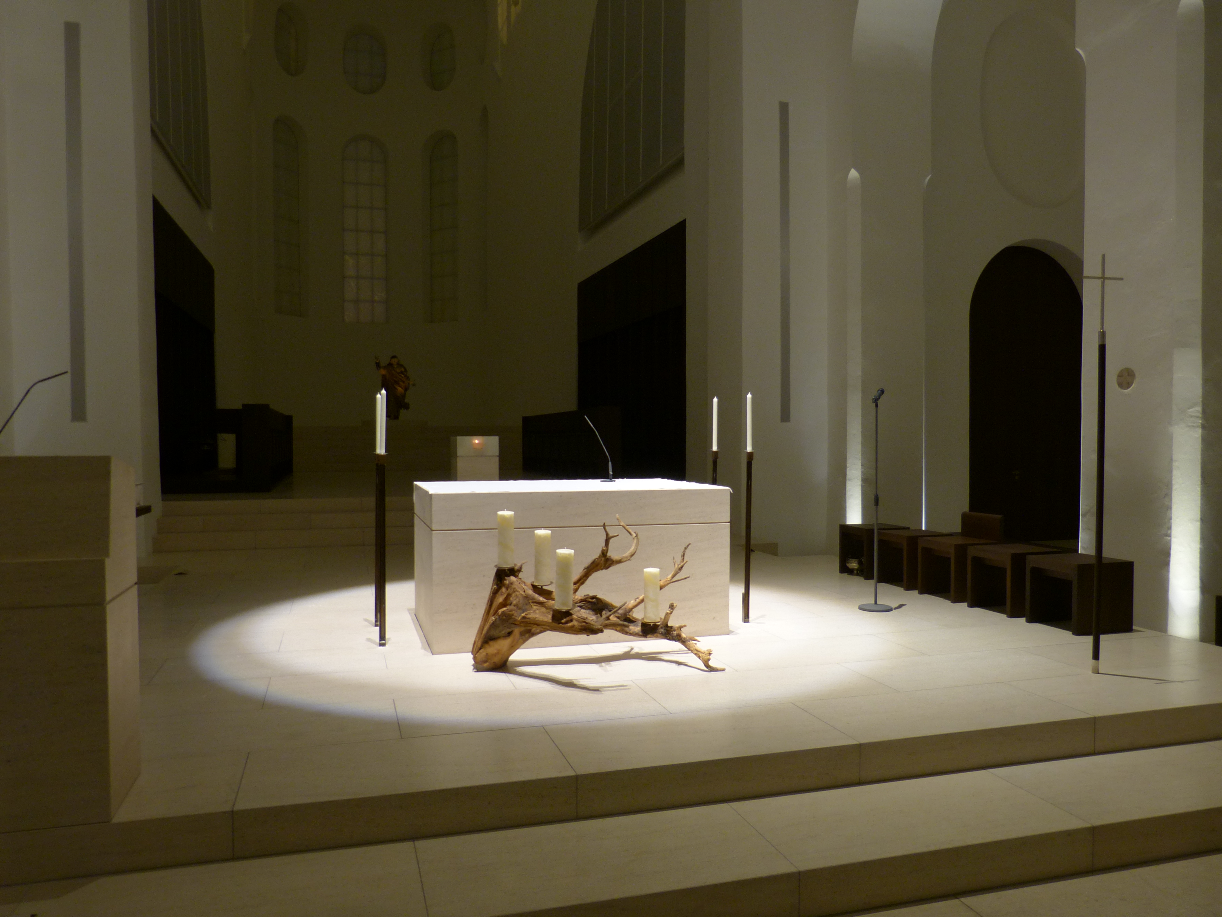 Augsburg, St. Moritz